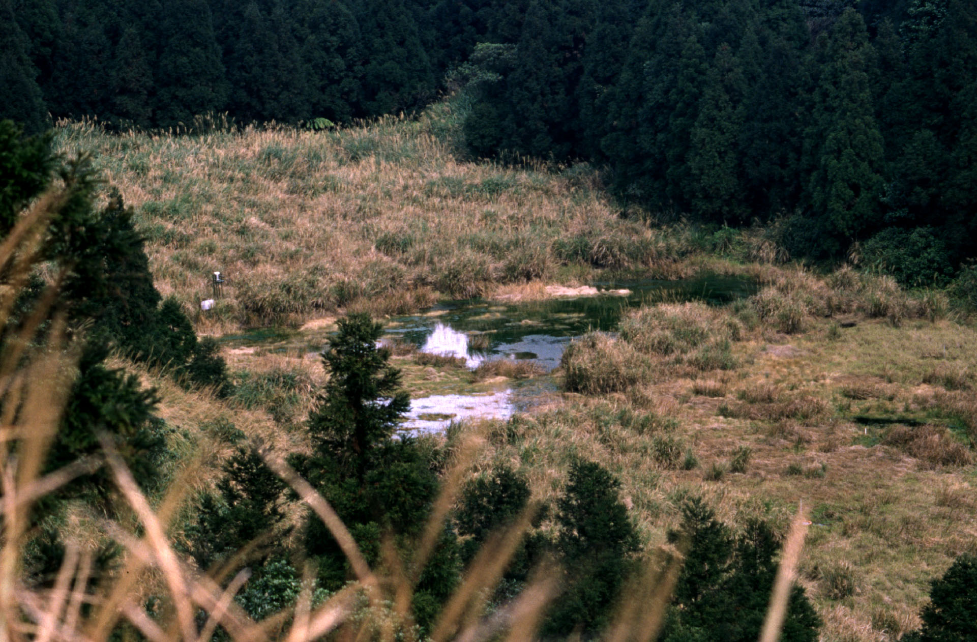 臺灣臺北市陽明山國家公園的夢幻湖